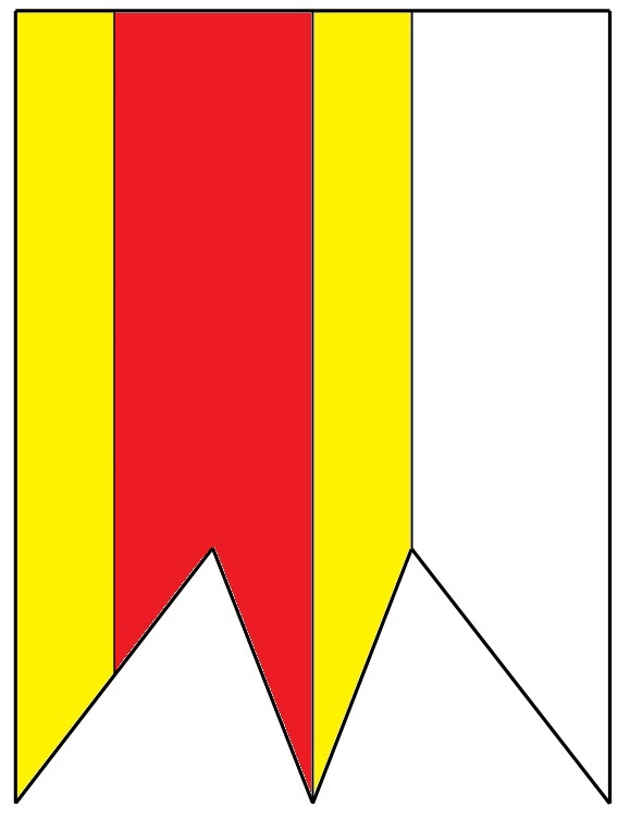 Filip238